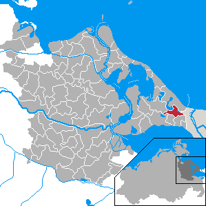 Korswandt, Landkreis Ostvorpommern, Mecklenburg-Vorpommern